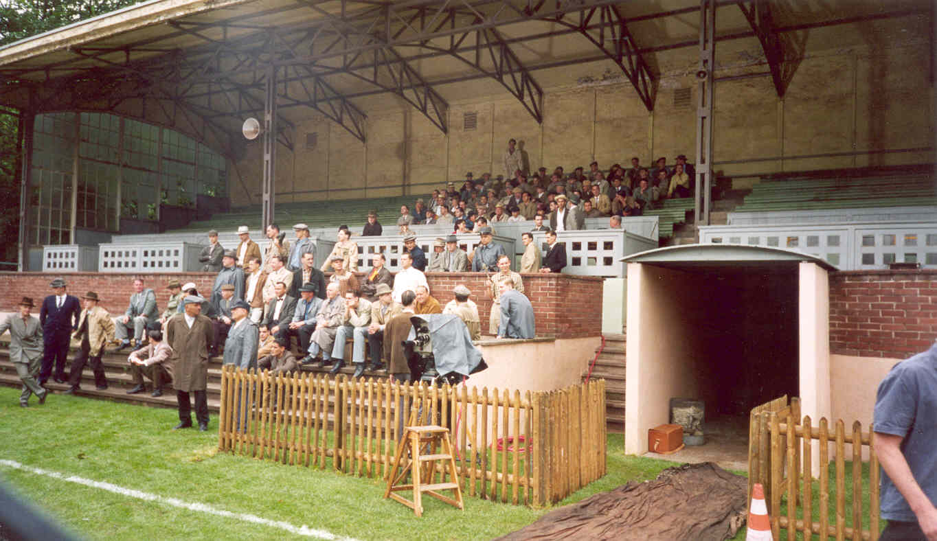 Dreharbeiten für den Film "Das Wunder von Bern"